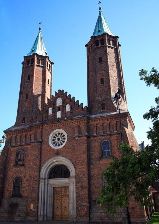 Polska